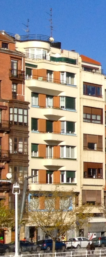 Número 6 de Erripa Kalea. 48001 Bilbao, España. Arquitectura racionalista del arquitecto Tomás Bilbao.